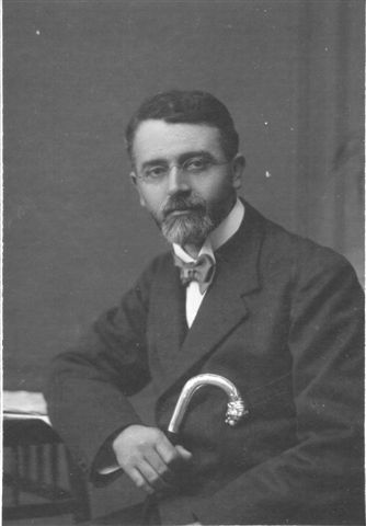 Urbano Salvolini nei primi anni del '900